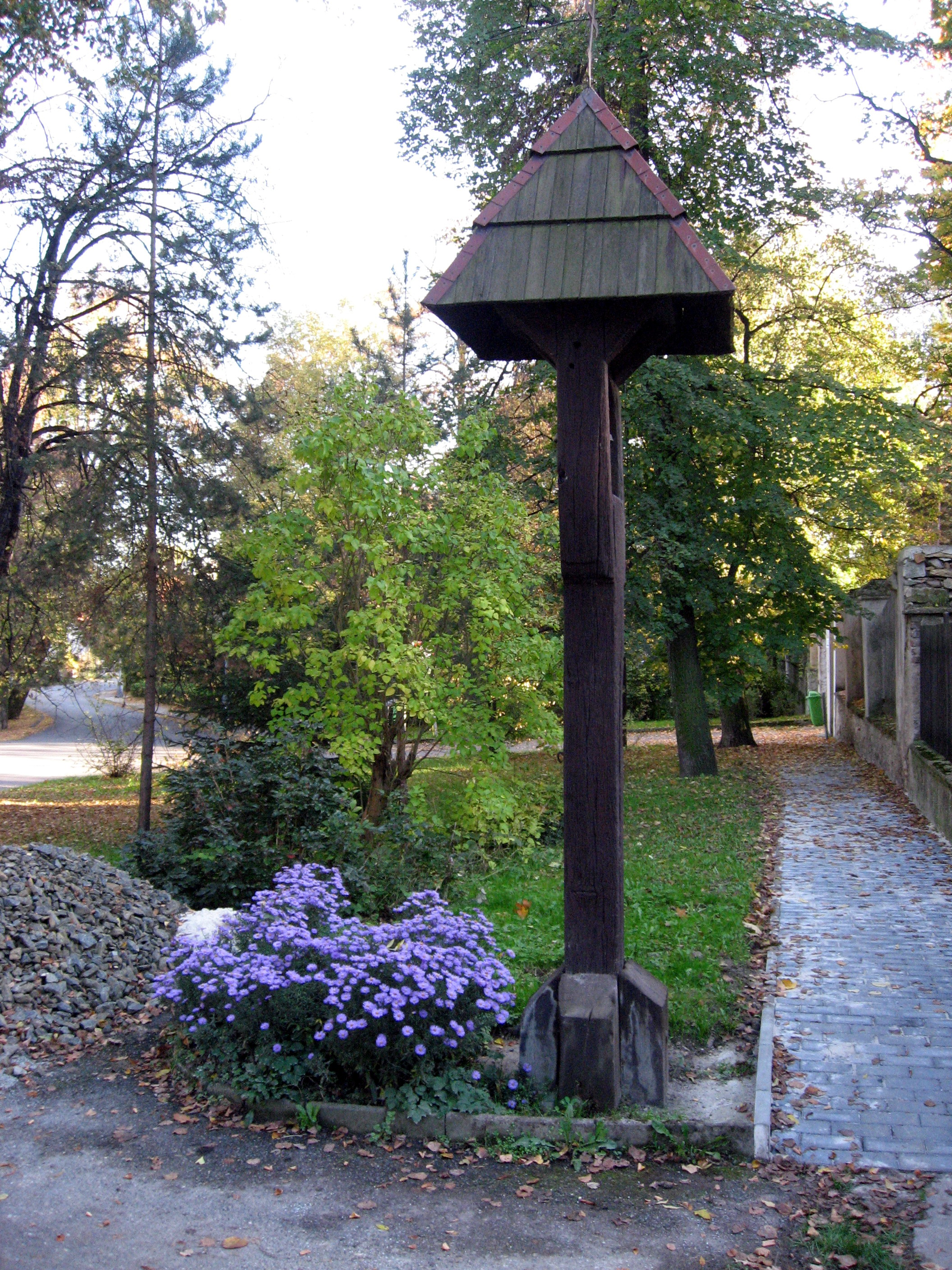 Hostavice, zvonička.